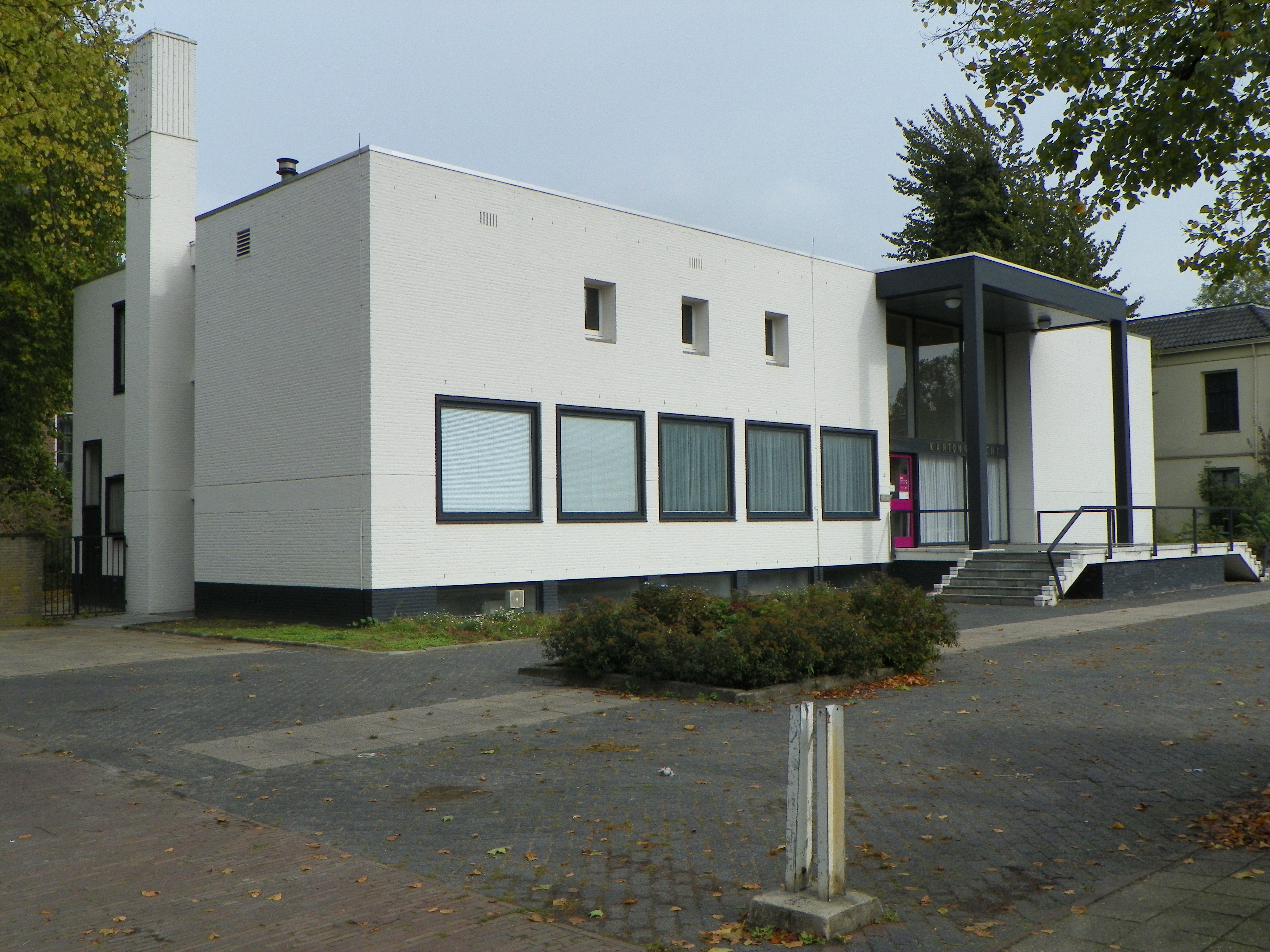 Kantongerecht Wageningen, 1964, J.J.M. Vegter